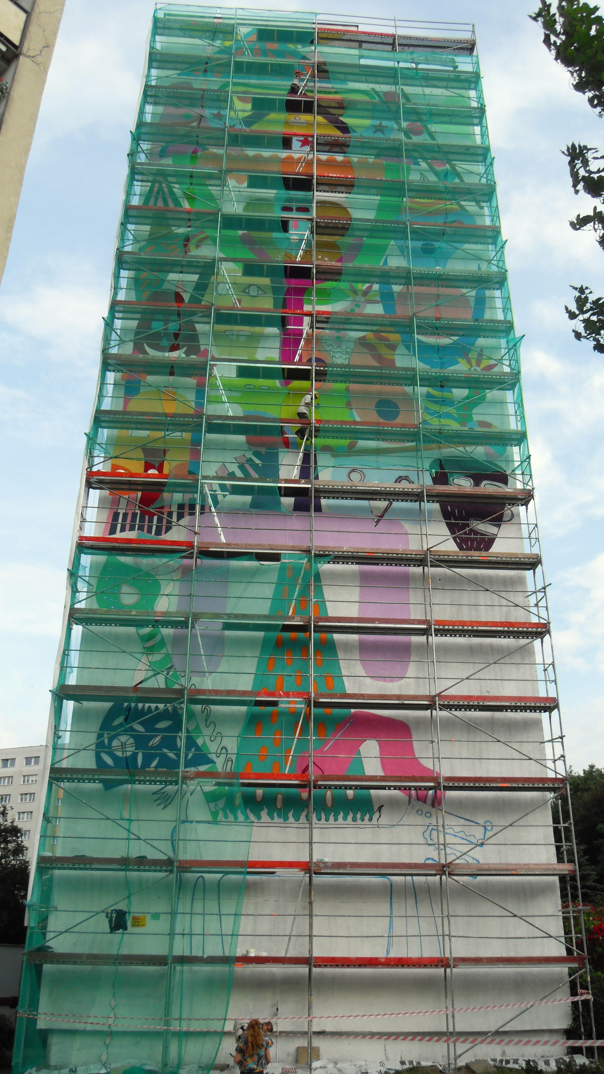 Gdańsk Zaspa Młyniec, ul. Pilotów 18. Powstaje mural, festiwal "Monumental Art" 2014.